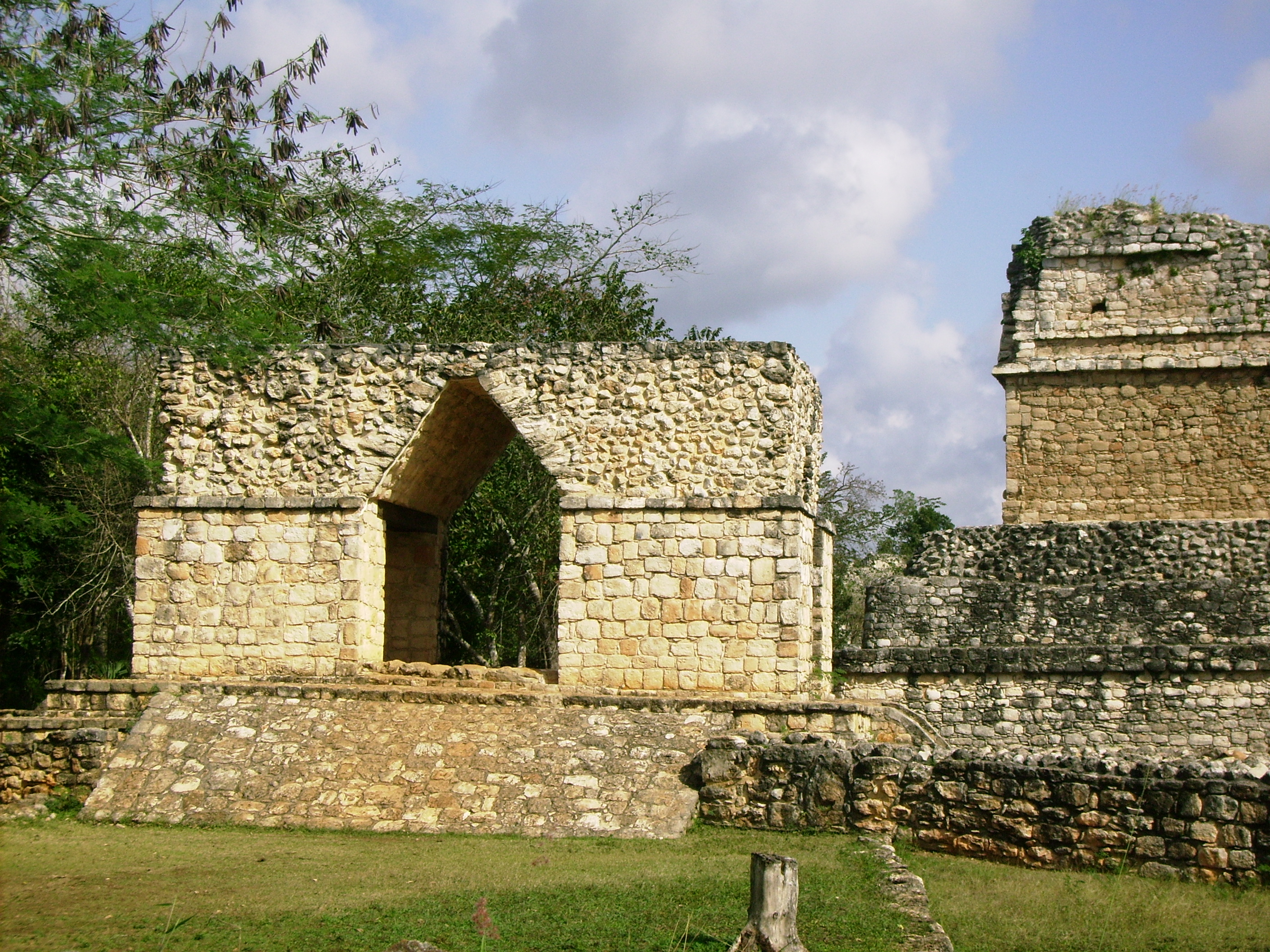 Entrance Arch, Ek'Balam or Ek Balam, Yucatán, Mexico